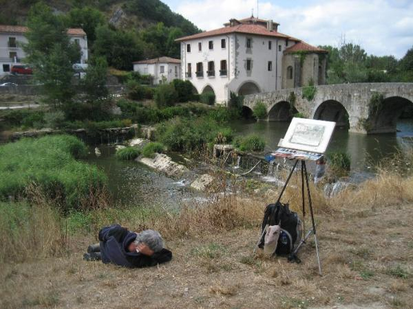 Pintando Trinidad de Arce